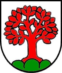 Wappen der politischen Gemeinde Schönenbuch, Schweiz